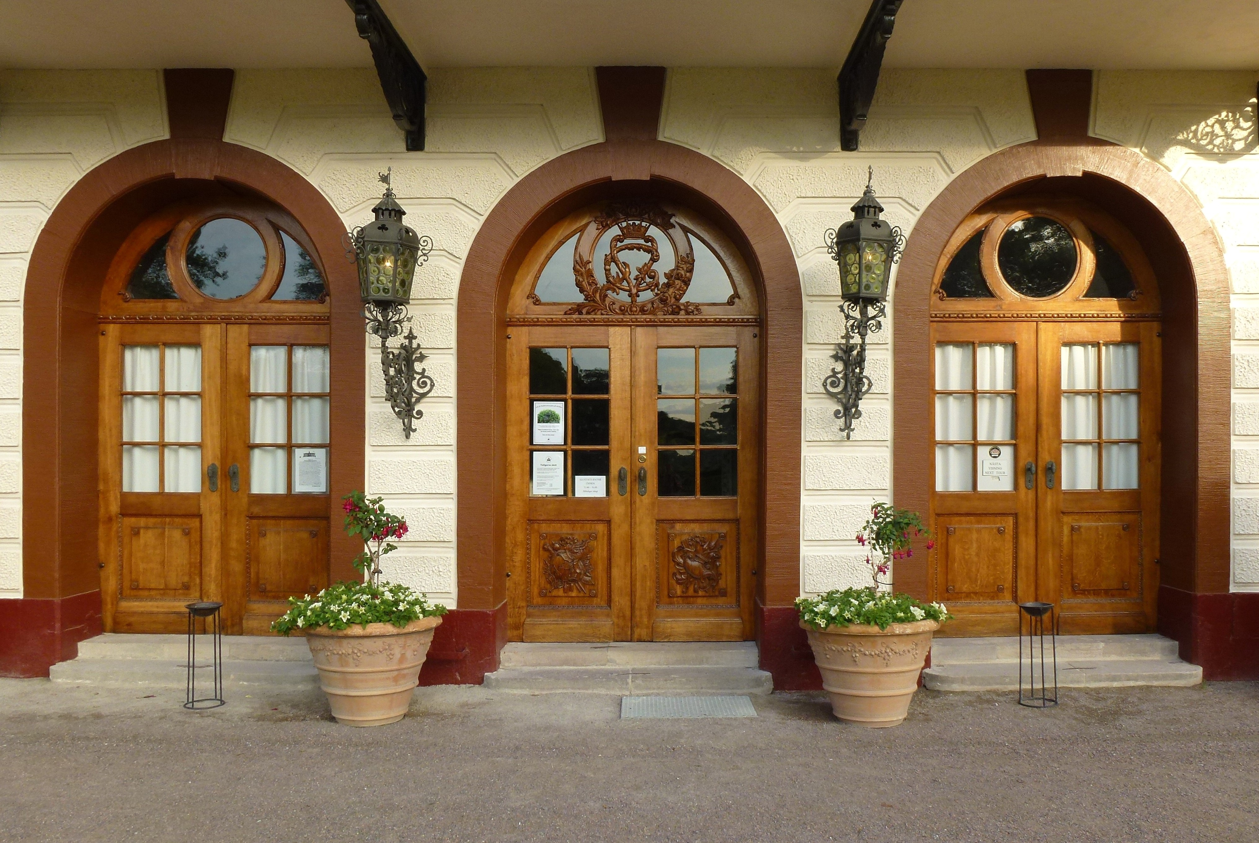 Tullgarns slott portar — i Sverige.